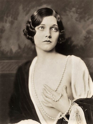 Adrienne Ames